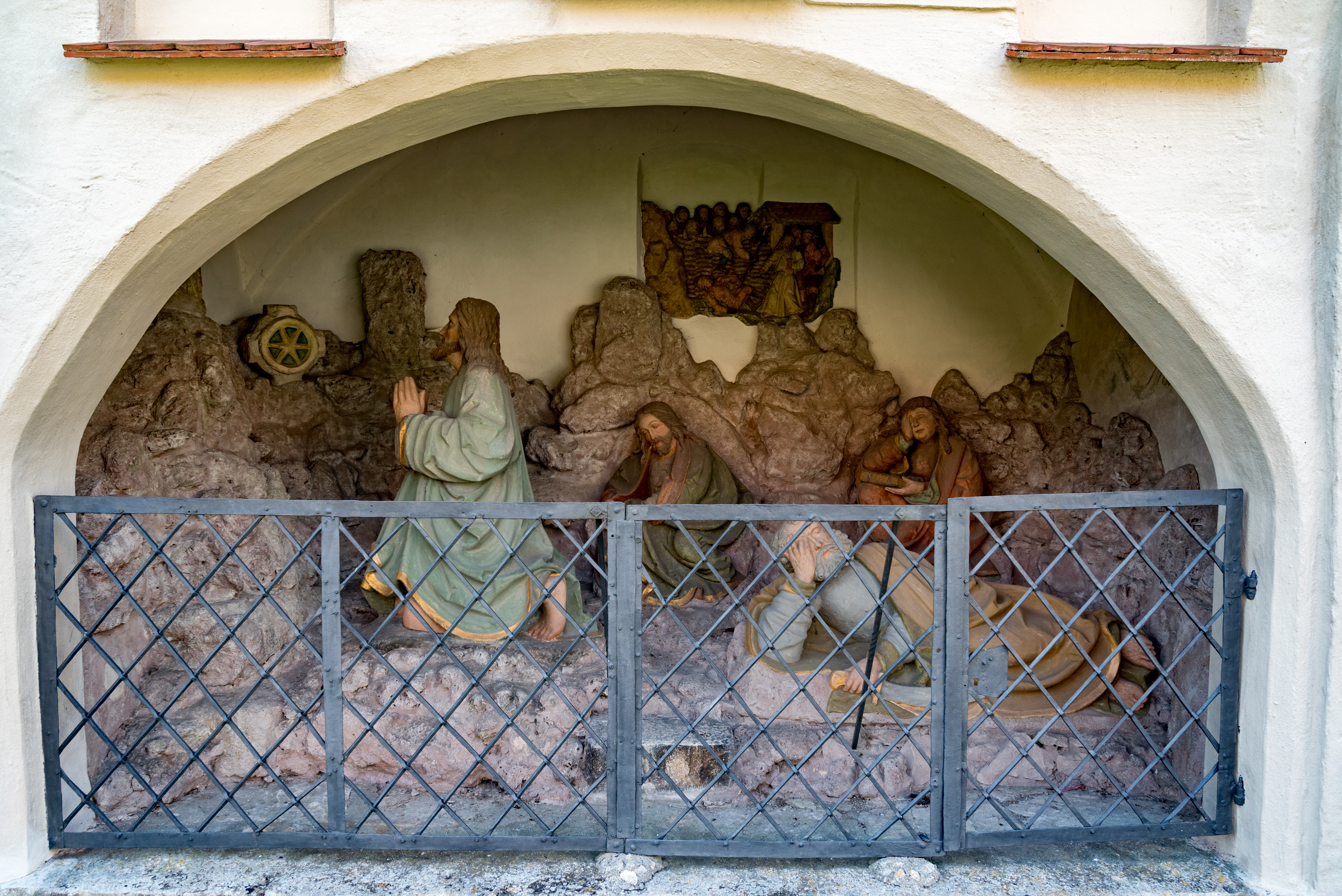 Berching, St.-Lorenz-Straße 2, Ölberg